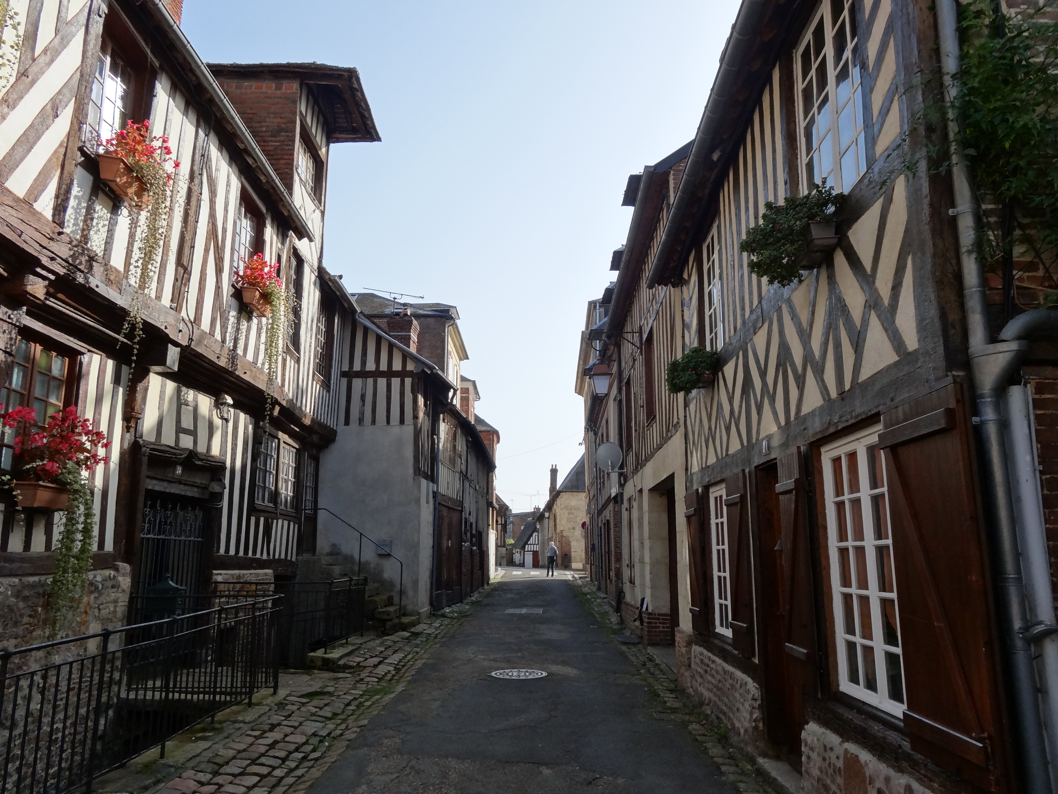 Orbec, rue des Religieuses. Le ruisseau appelé la Vespière se divise en plusieurs canaux qui parcourent les rues de la ville avant de se jeter dans l'Orbiquet.